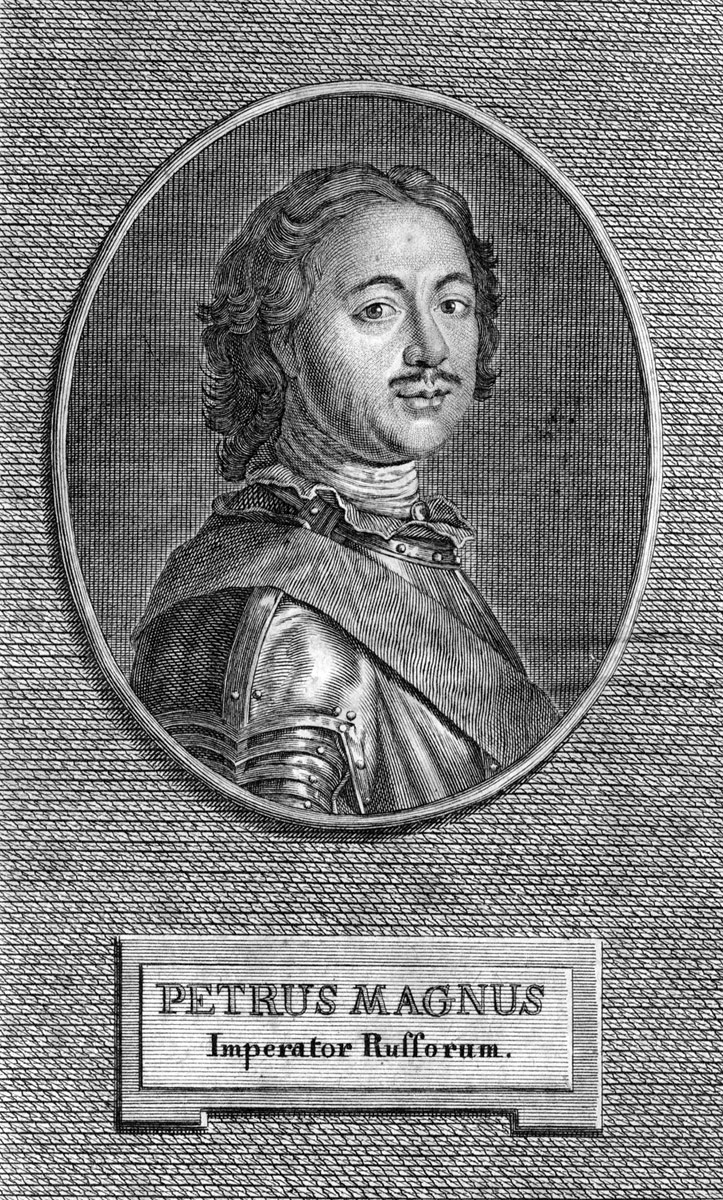 Peter the Great, from: Jacob von Stählin-Storksburg: Originalanekdoten von Peter dem Großen, Leipzig, Breitkopf, 1785